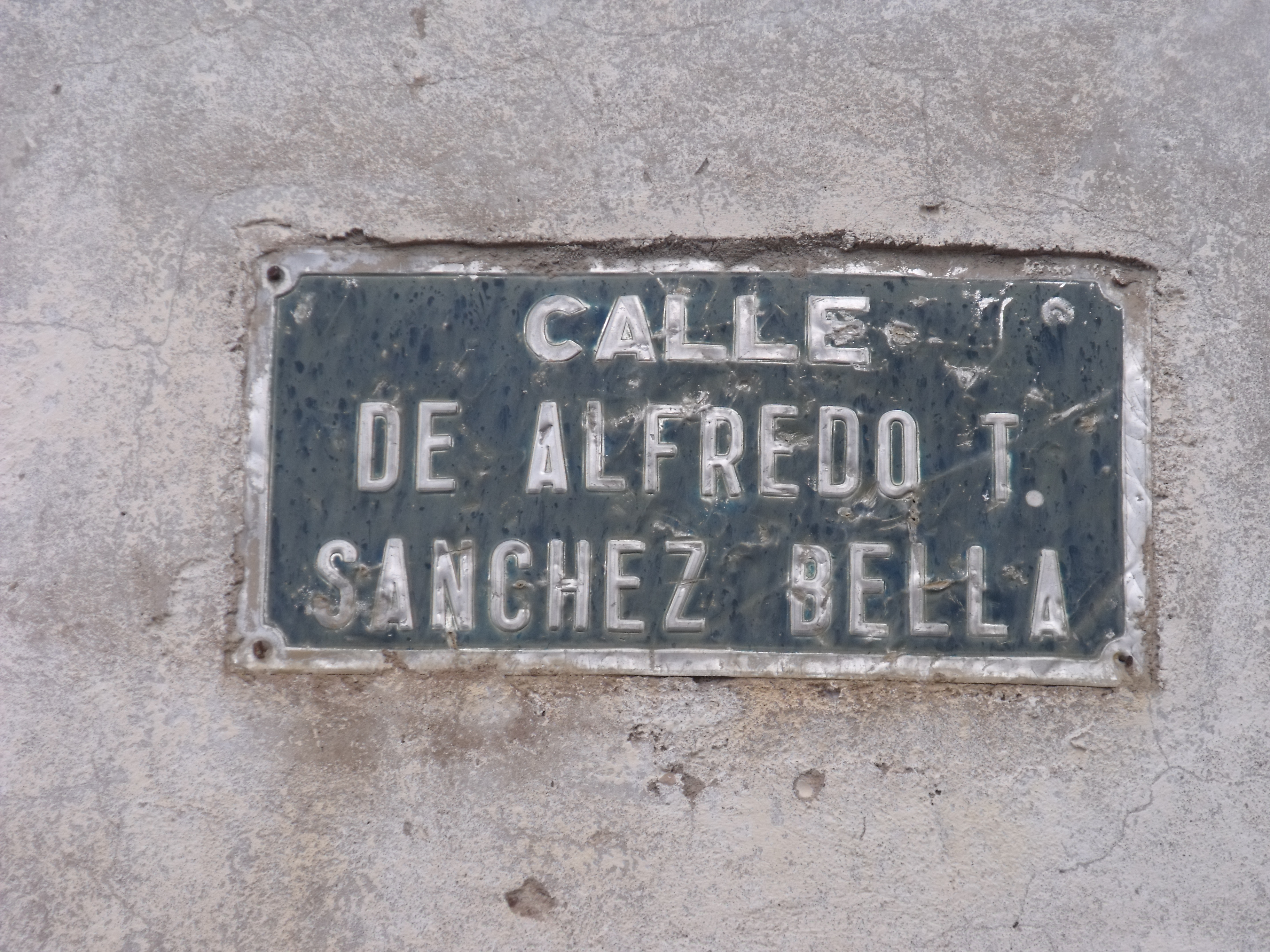 Placa calle de Tordesilos